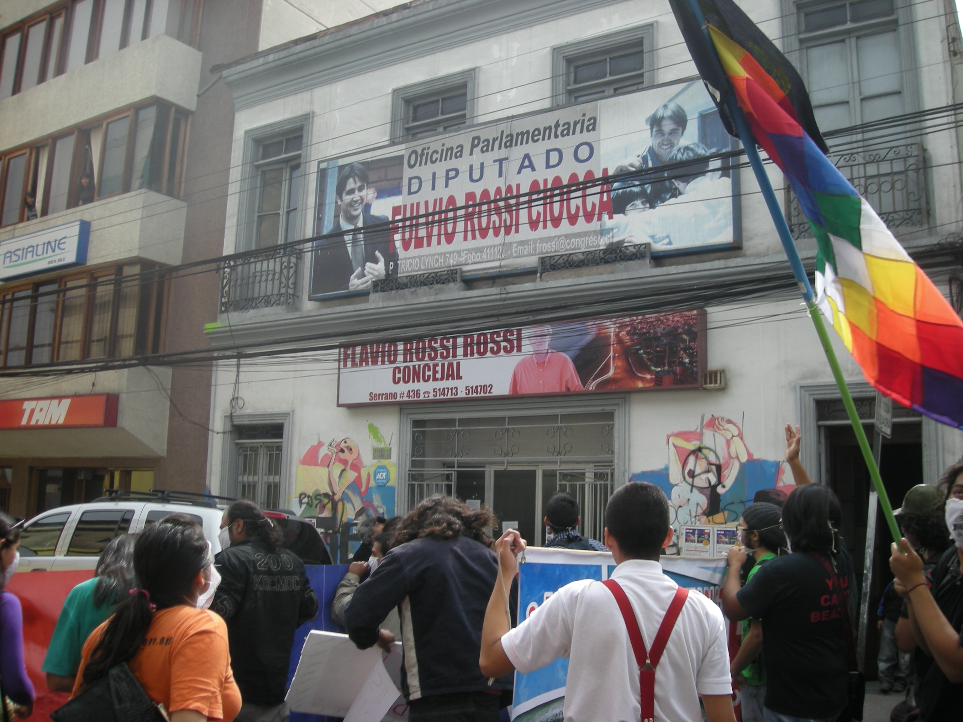 Cuando tenía pelo negro.